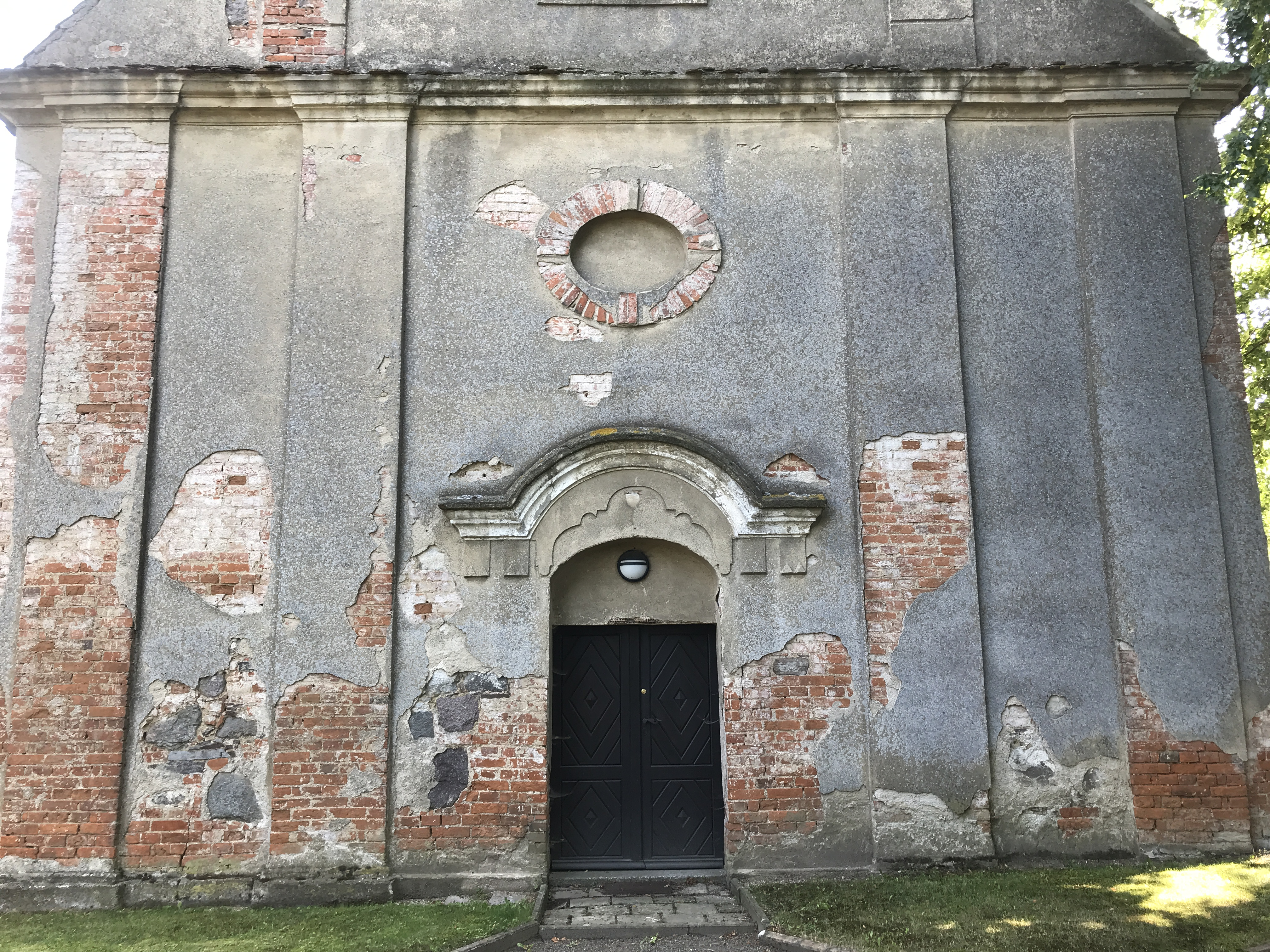 Die Kirche Kreckow in der Gemeinde Groß Miltzow im Landkreis Mecklenburgische Seenplatte in Mecklenburg-Vorpommern ist eine Feldsteinkirche aus dem Ende des 13. Jahrhunderts. Im Innern steht unter anderem ein Kanzelaltar aus der Mitte des 18. Jahrhunderts.